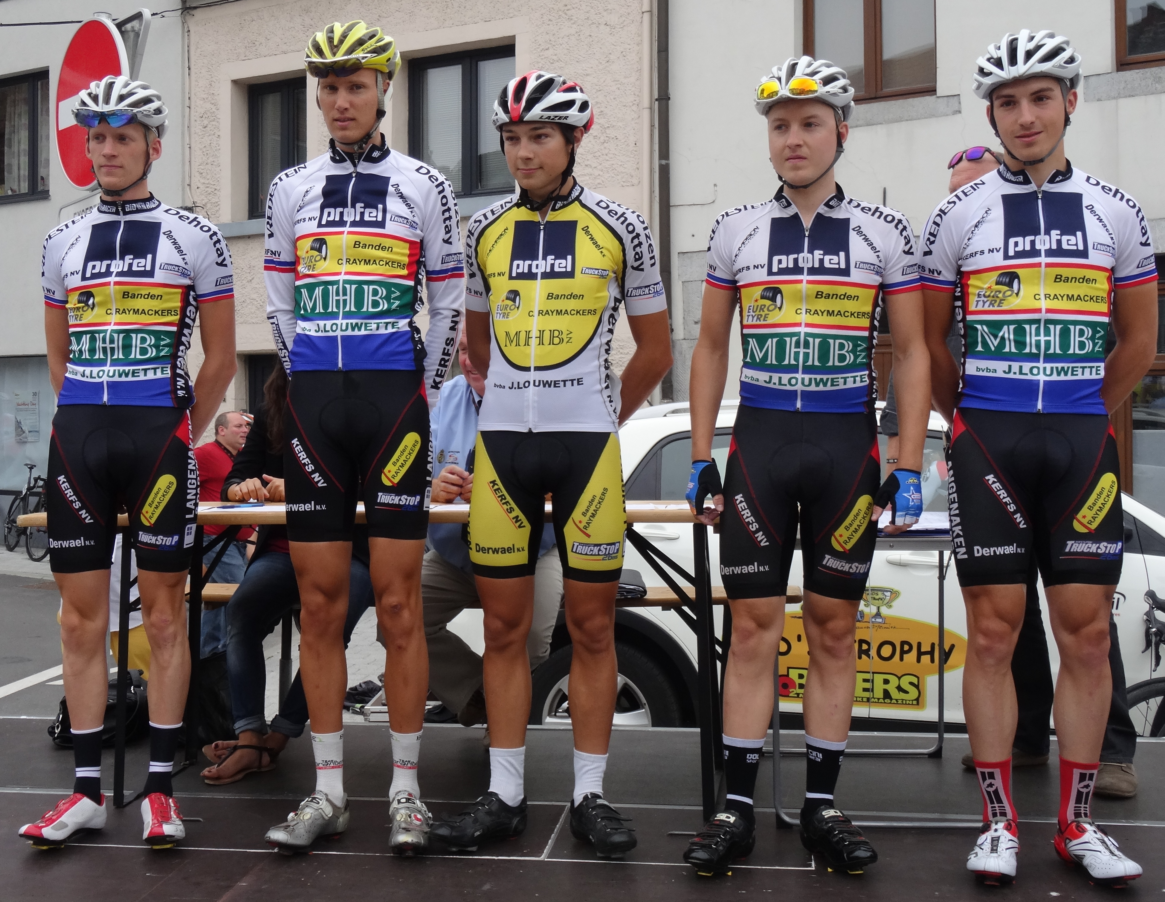 Reportage photographique réalisé le mercredi 6 août à l'occasion du départ de la première étape du Tour de la province de Namur 2014 à Jambes (Namur), Belgique.